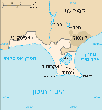 Akrotiri map